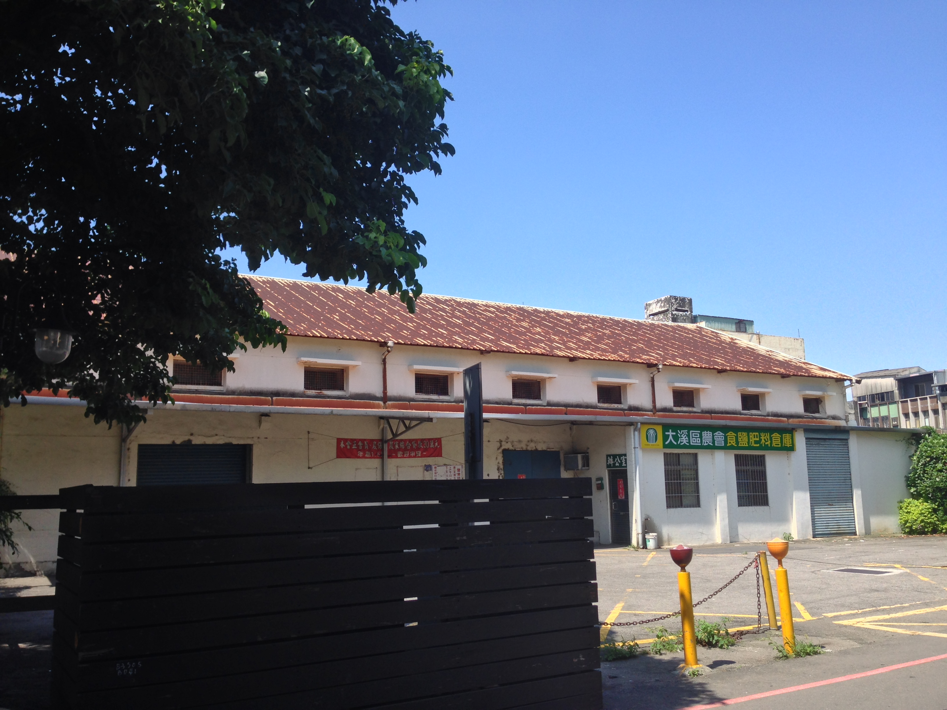 中文（台灣）: 桃園市立大溪木藝生態博物館食鹽肥料倉庫，目前由財政部國有財產署租賃予大溪區農會作為肥料倉庫使用。